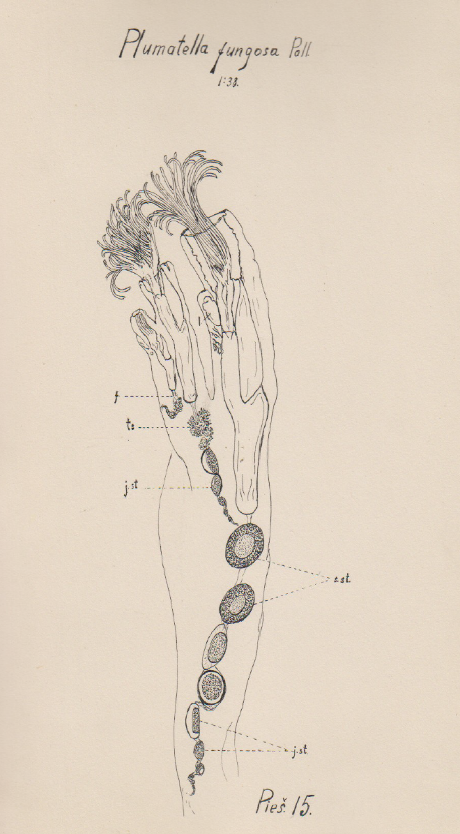 Samangyviai, orig. B. Pajiedaitės iliustracija